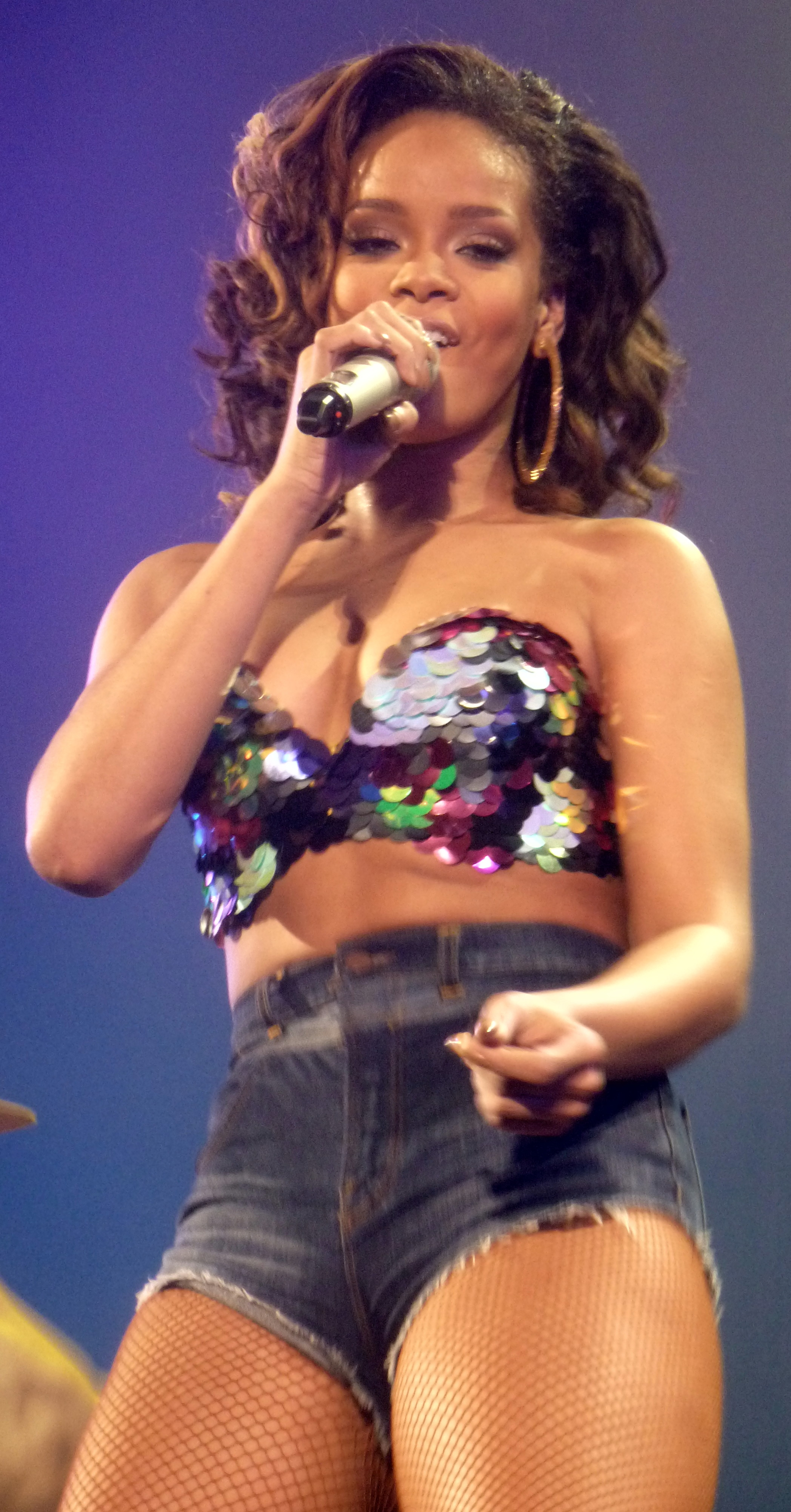 Rihanna en concert à Paris Bercy lors de sa tournée Loud Tour en Octobre 2011